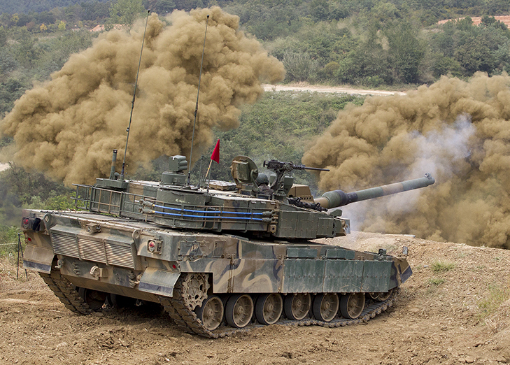 촬영 : 정승익 작가